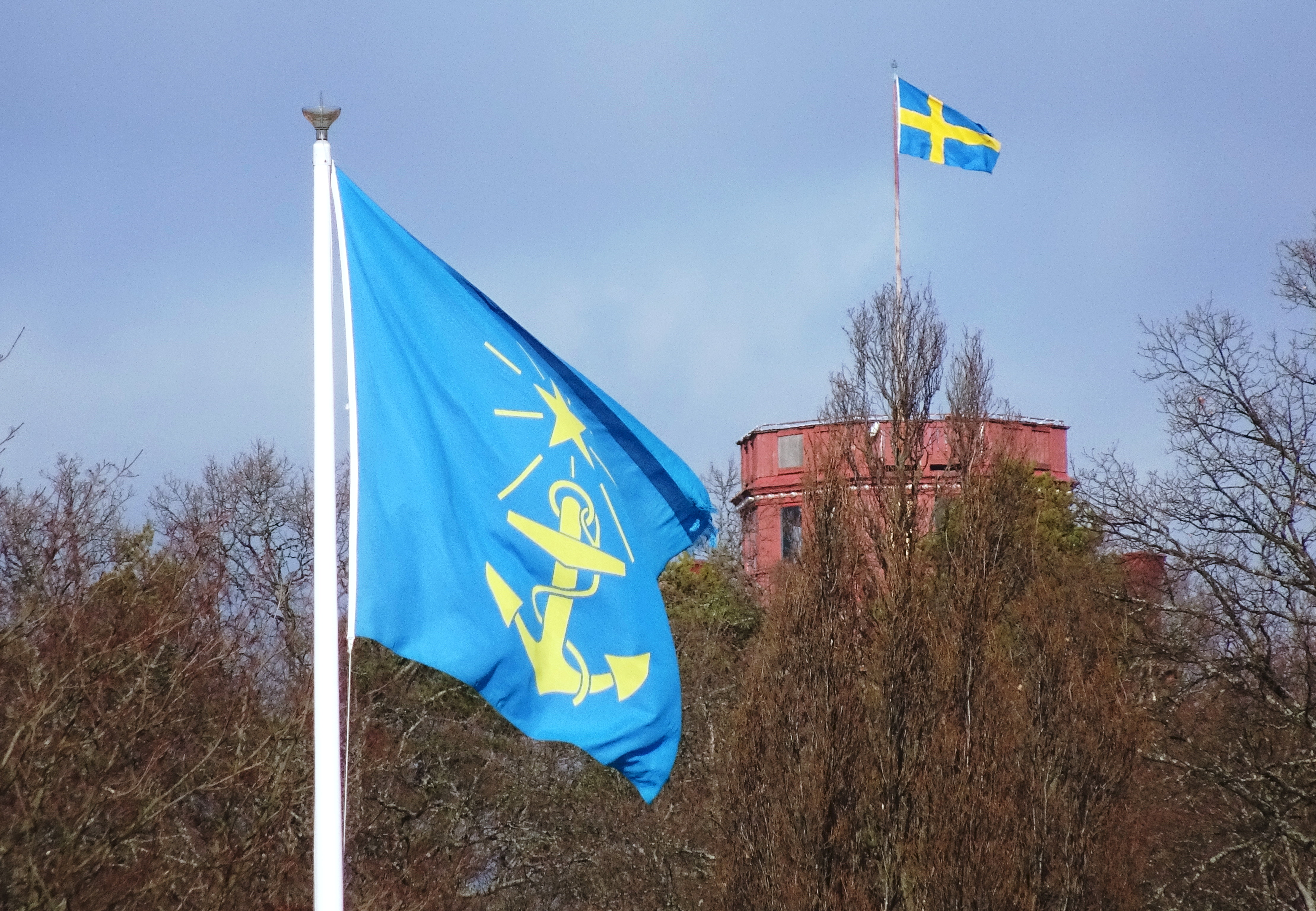 Sjöfartsverket, Södra Djurgården, flagga